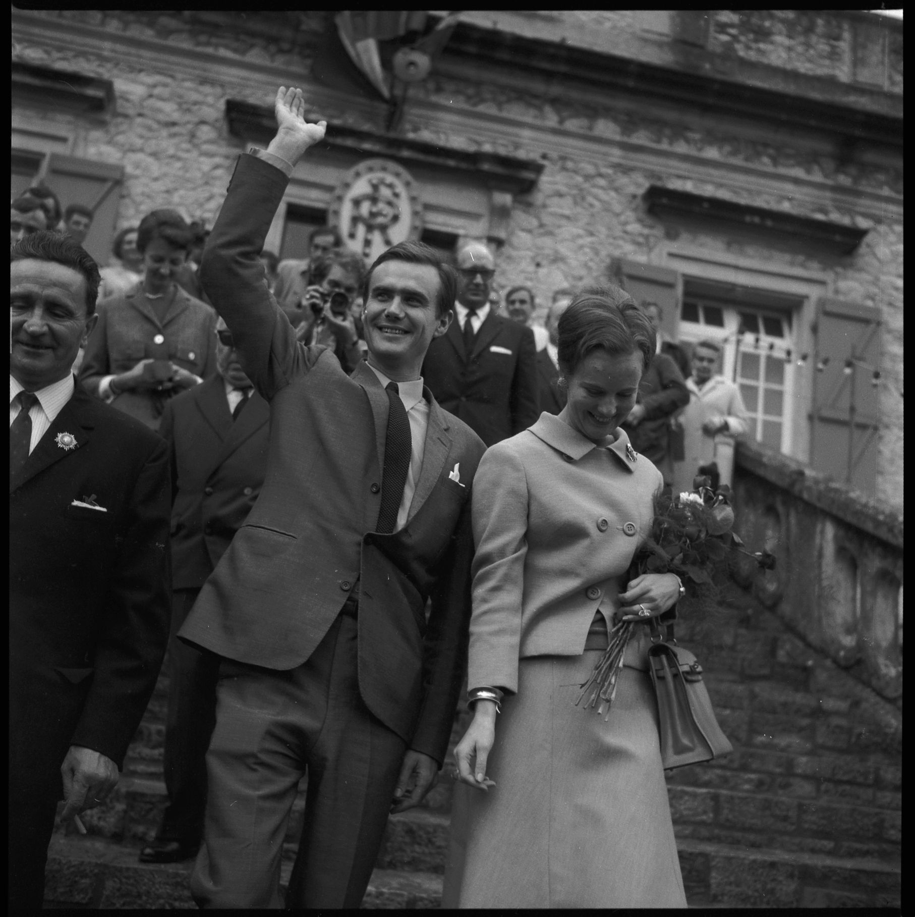 Dans le Lot. 12-16 Octobre 1966. Vue du couple princier du Danemark devant une mairie du Lot au milieu de la foule.